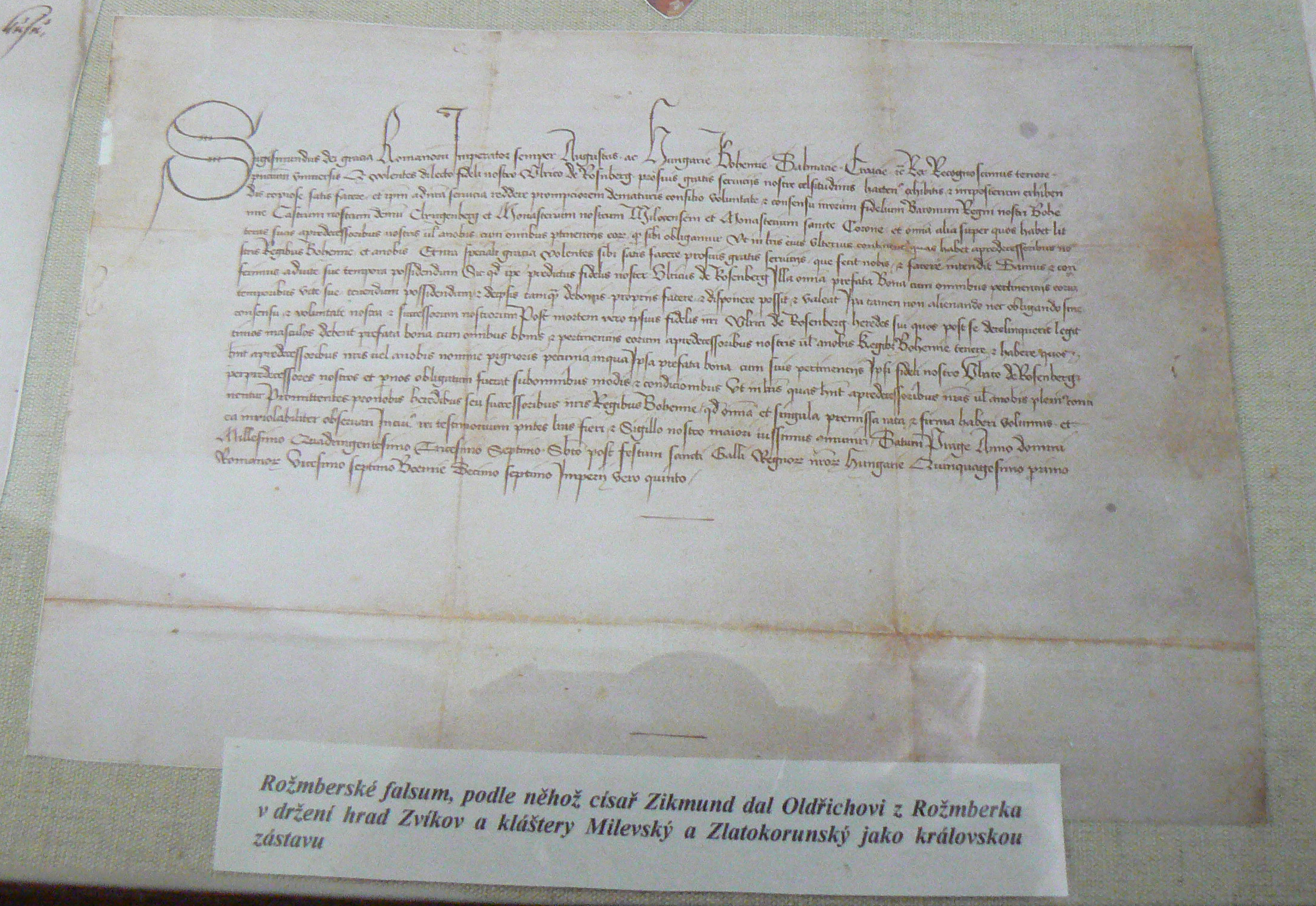 Falsum Oldřicha II. z Rožmberka